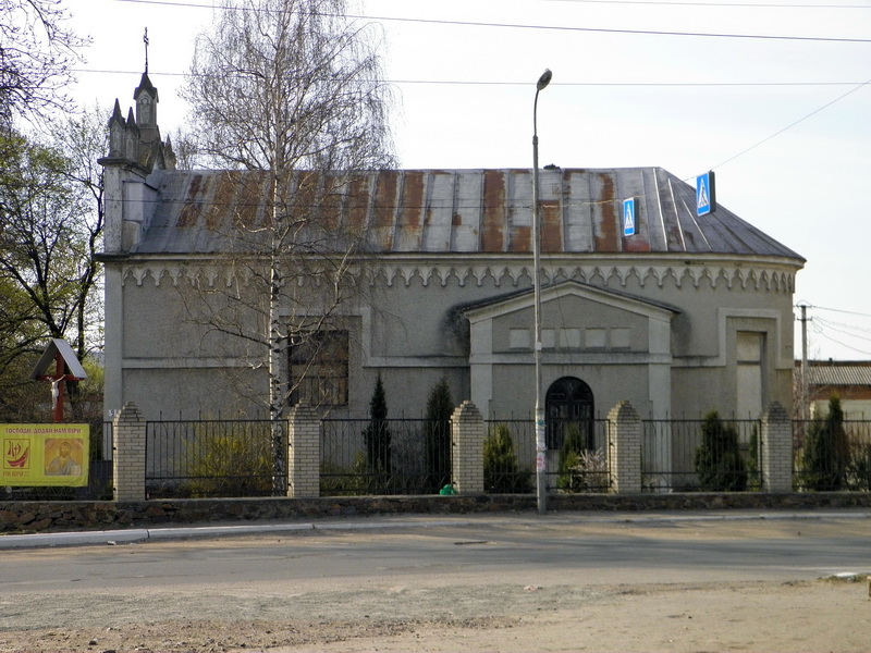 Неоготичний костел-каплиця, що зберігся від палацу Петра Мошинського. Останній було закладено над ставом р. Дохни у 1819 році. Архітектор Любовидзький